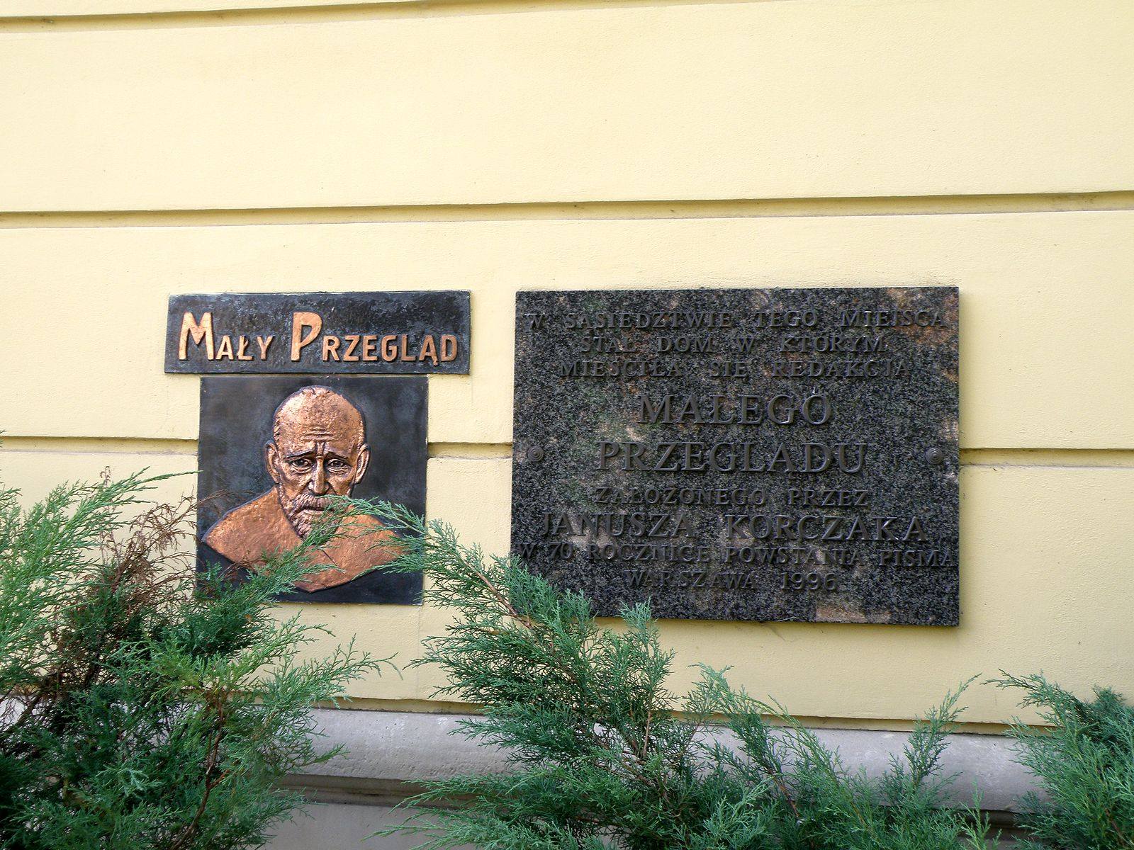 Tabliczka upamiętaniająca czasopismo wydawane przez Korczaka na Nowolipkach